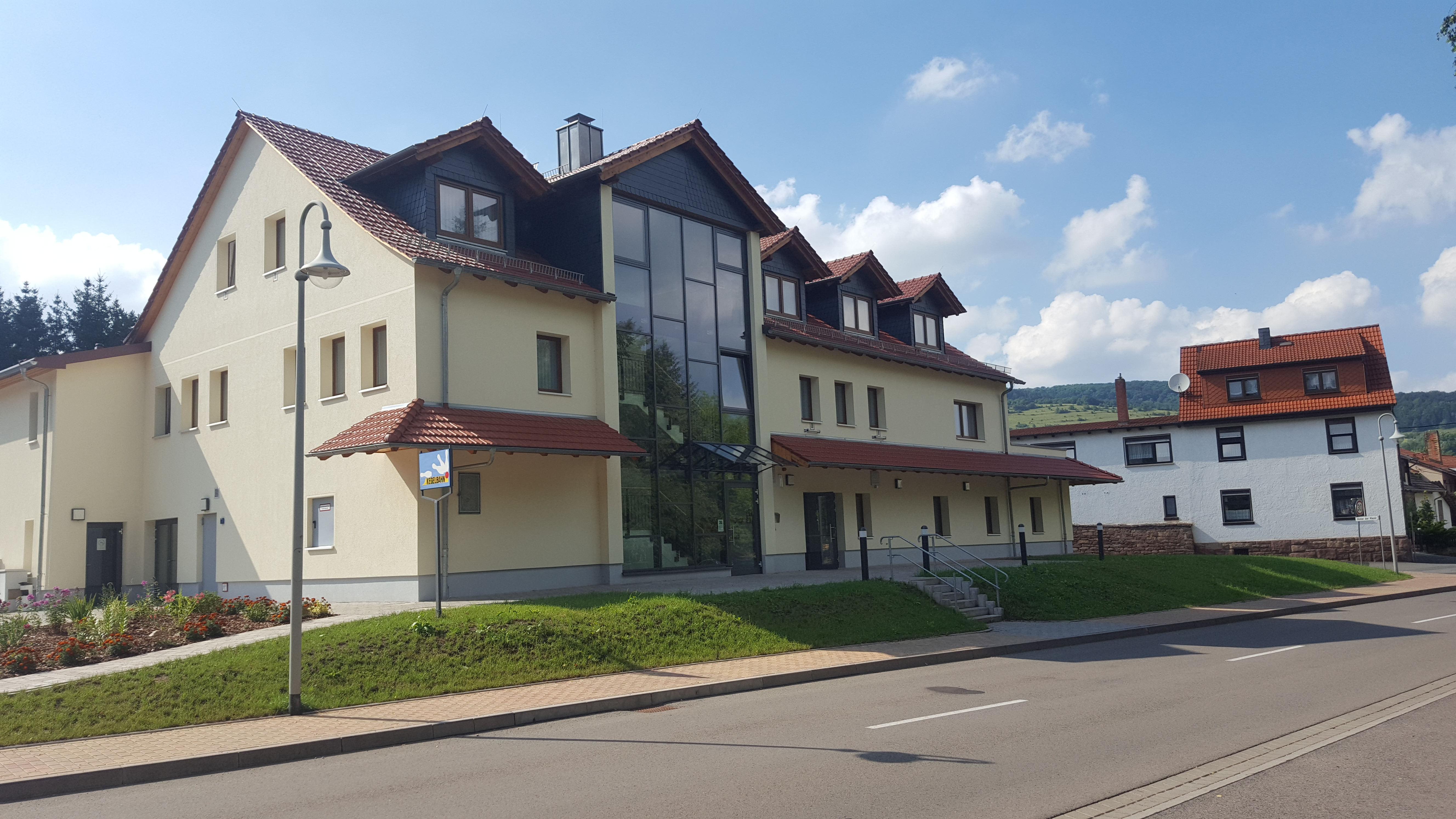 Kulturhaus Bettenhausen nach Umbau